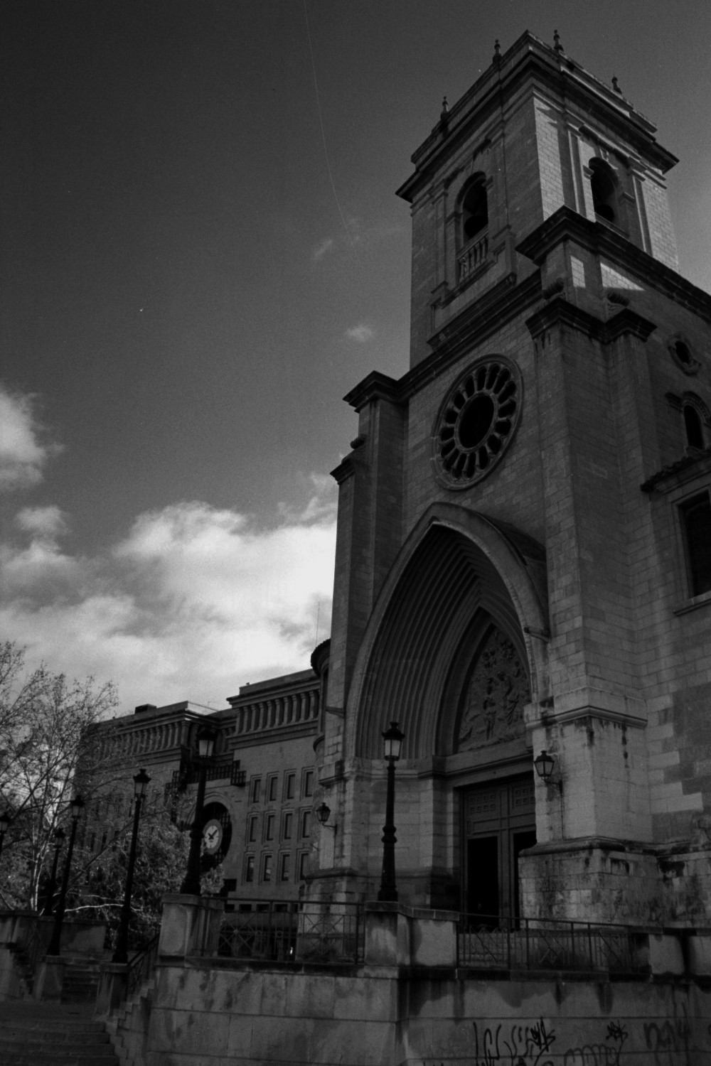 Catedral y Ayuntamiento 1 - Albacete